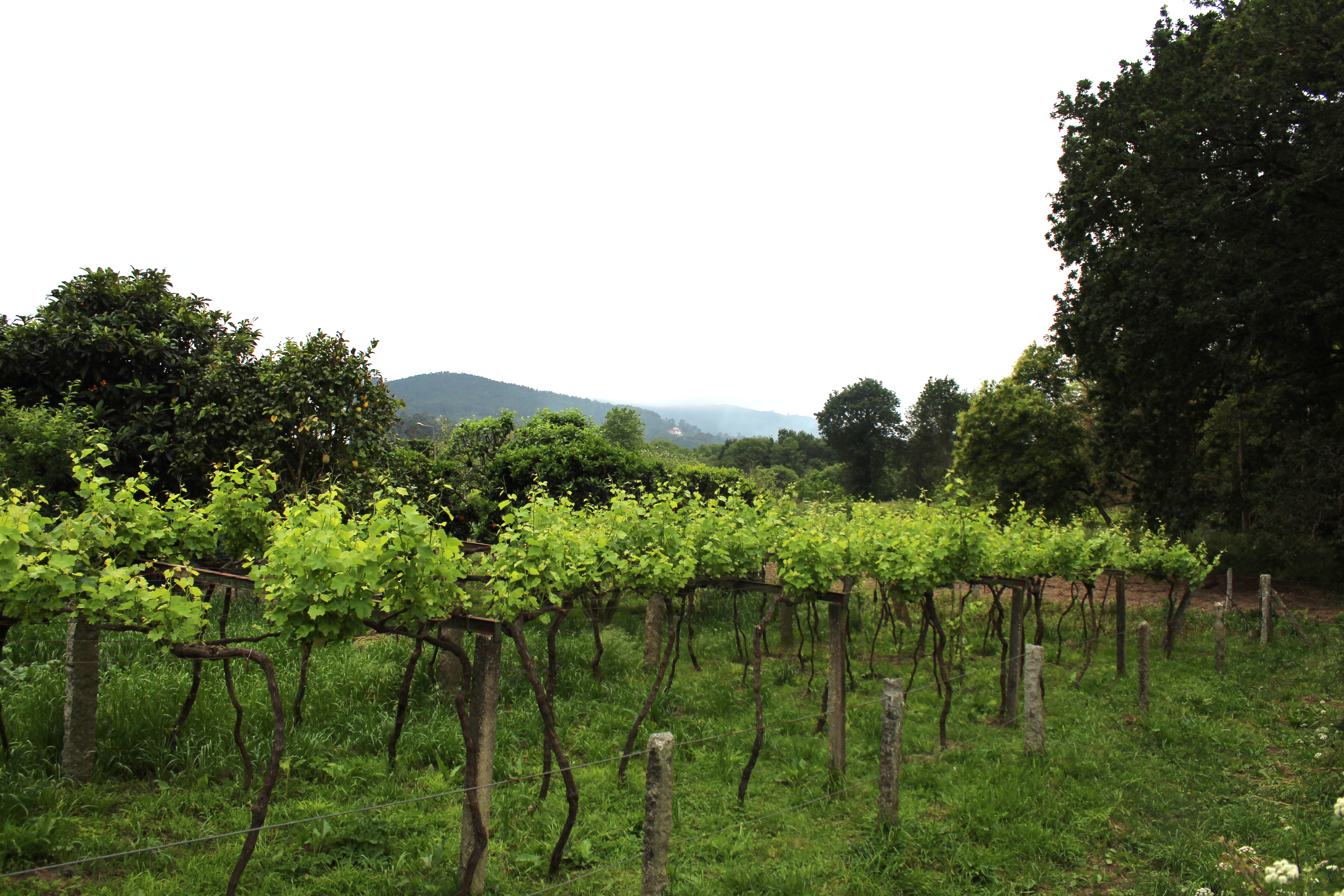 Núcleo urbano da Ponte